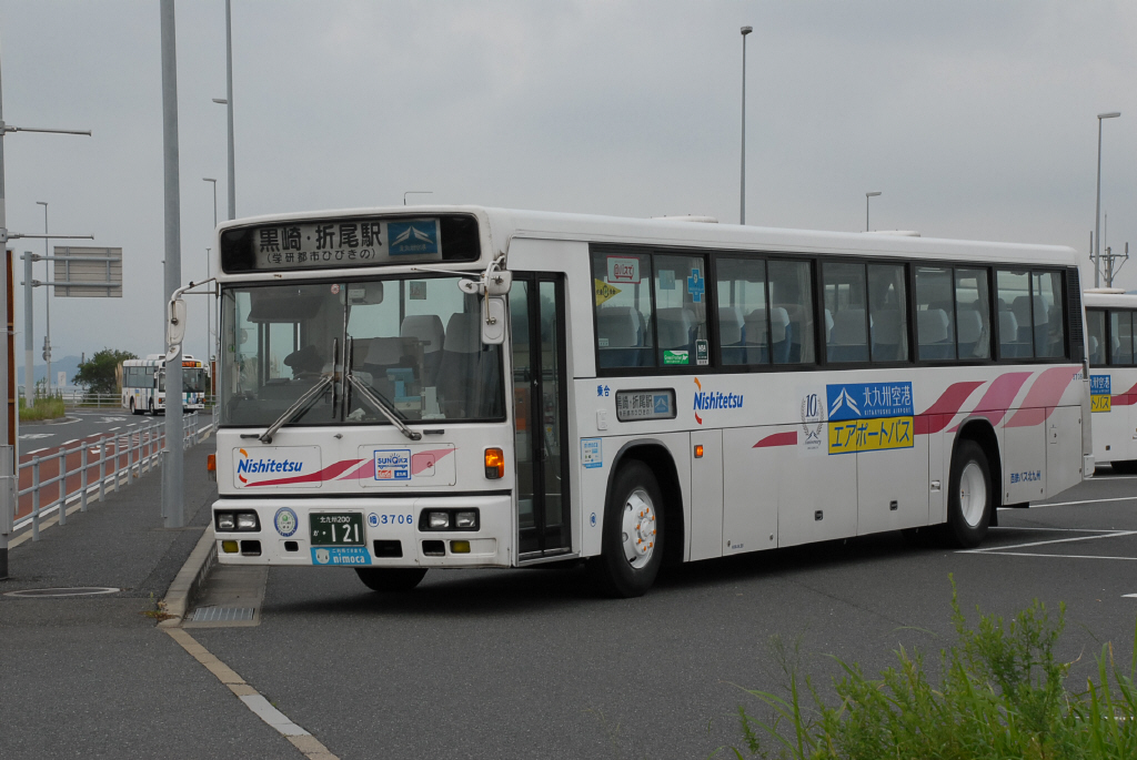 北九州空港待機場出口にて撮影